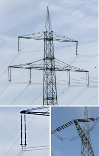 Support pylon Description in de wikipedia: Hochspannungsmast Tragmast im großen Bild mit vergrößertem Isolator unten links. Unten rechts zum Vergleich die Isolatorengruppe eines Abspannmasts. Das Bild wurde von mir selbst am 26.04.2004 fotografiert und unter der GFDL in Wikipedia veröffentlicht.